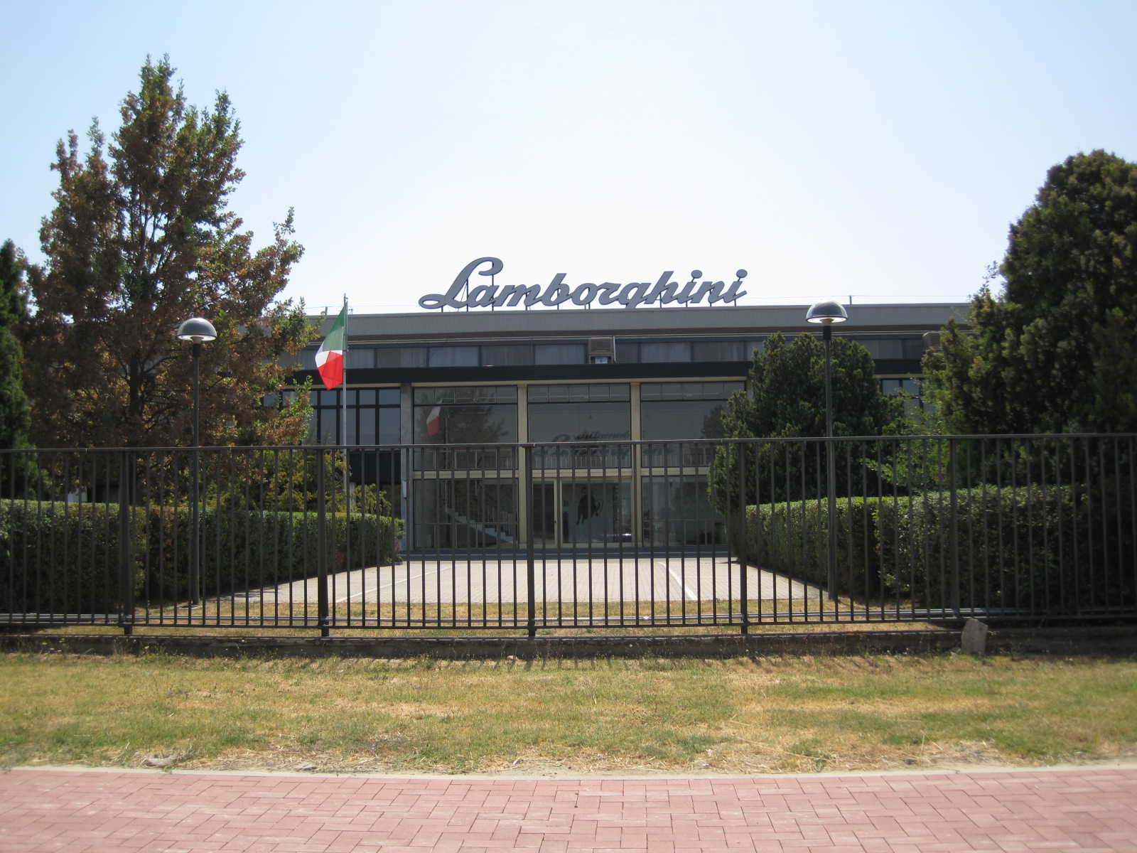 Usine et Musée Lamborghini - Sant'Agata Bolognese